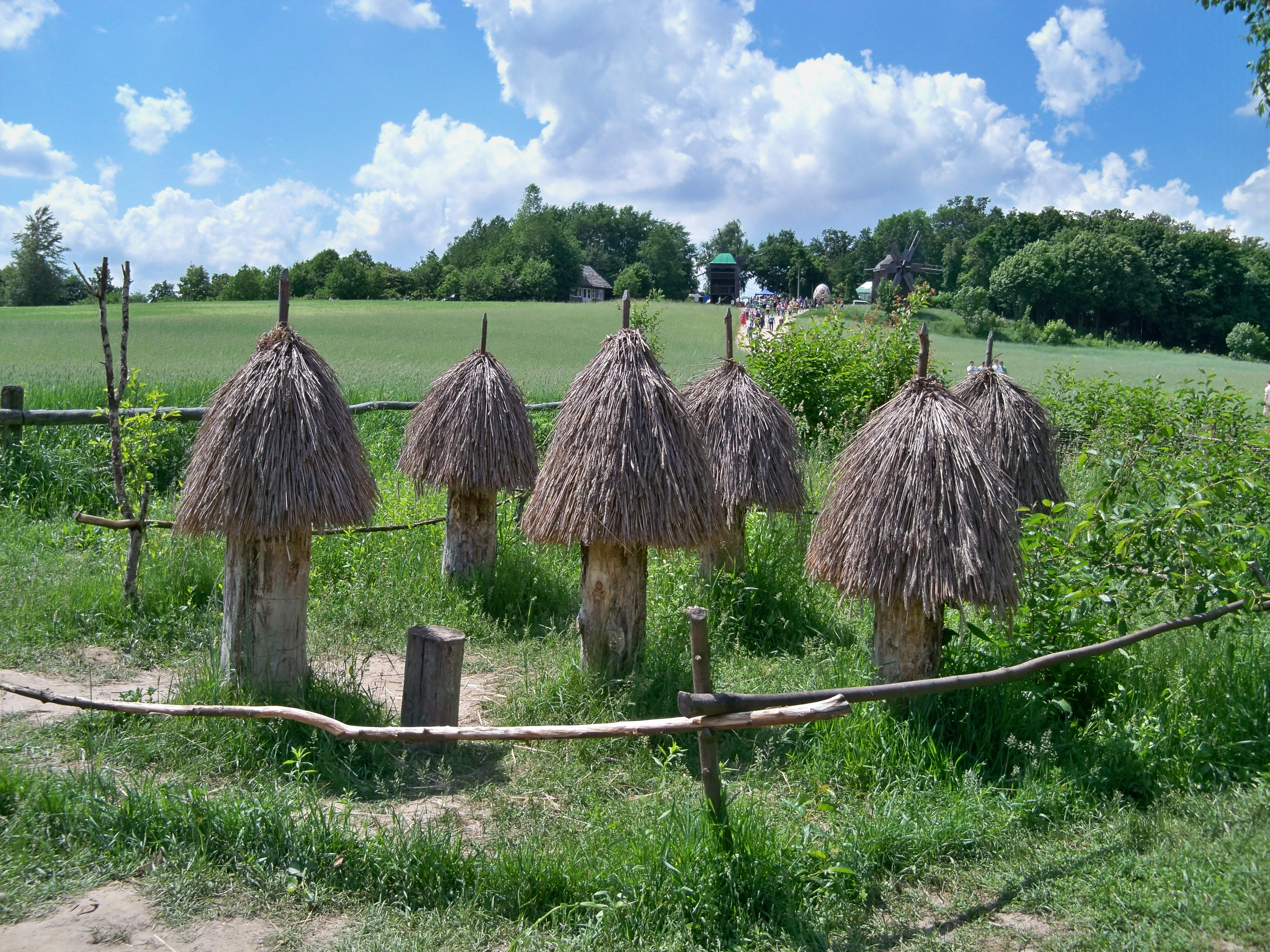 Національний музей народної архітектури і побуту України (село Пирогів), Київ, Червонопрапорна вул., село Пирогів